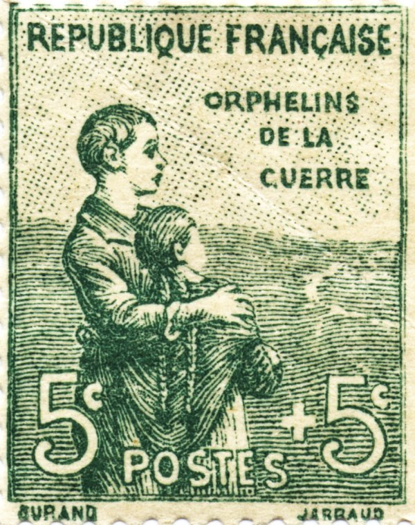 Série Orphelins, 5 c. + 5 c., mars 1919 (source de la date : Dallay et Le Patrimoine du timbre-poste français).